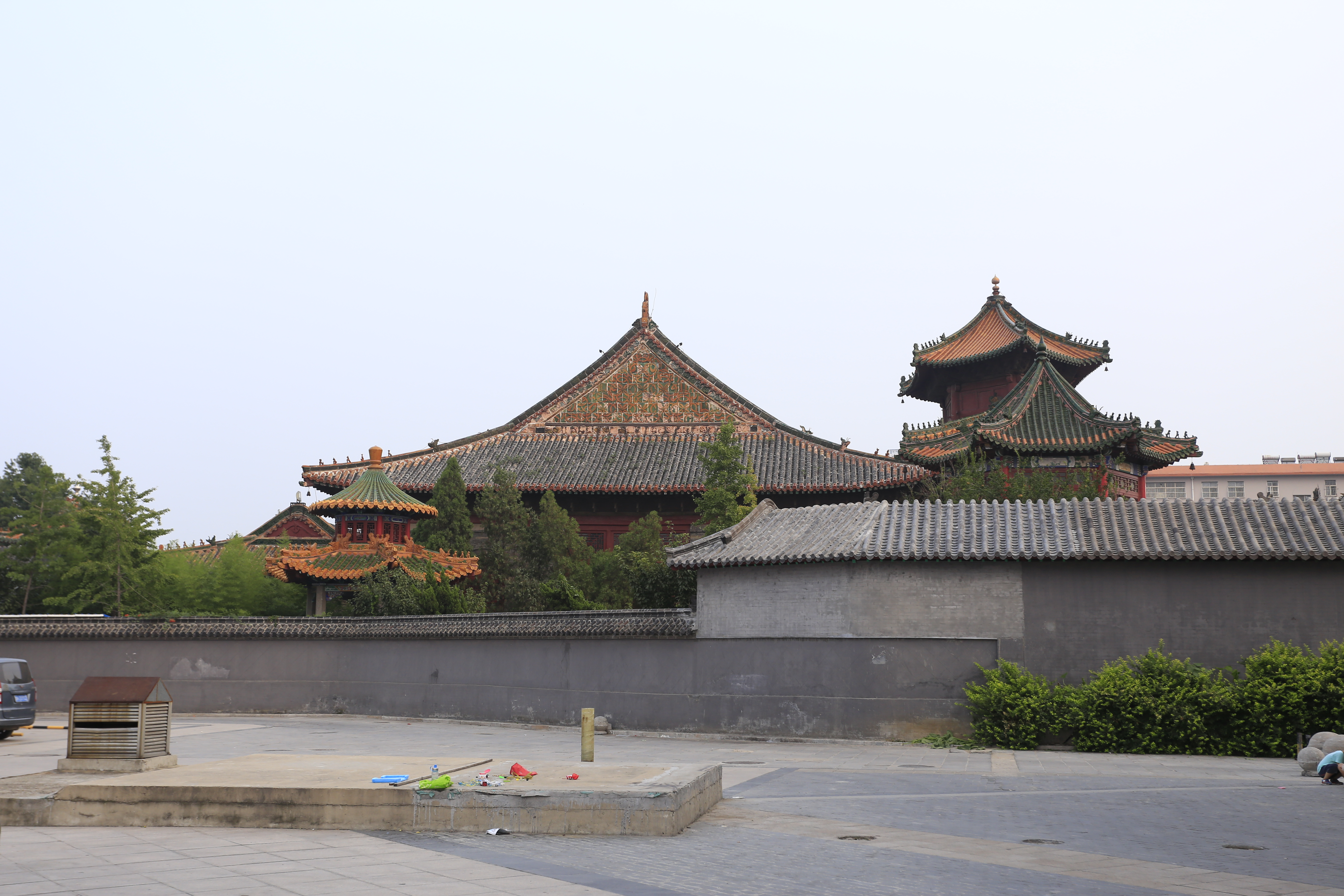 济宁东大寺 大殿北面